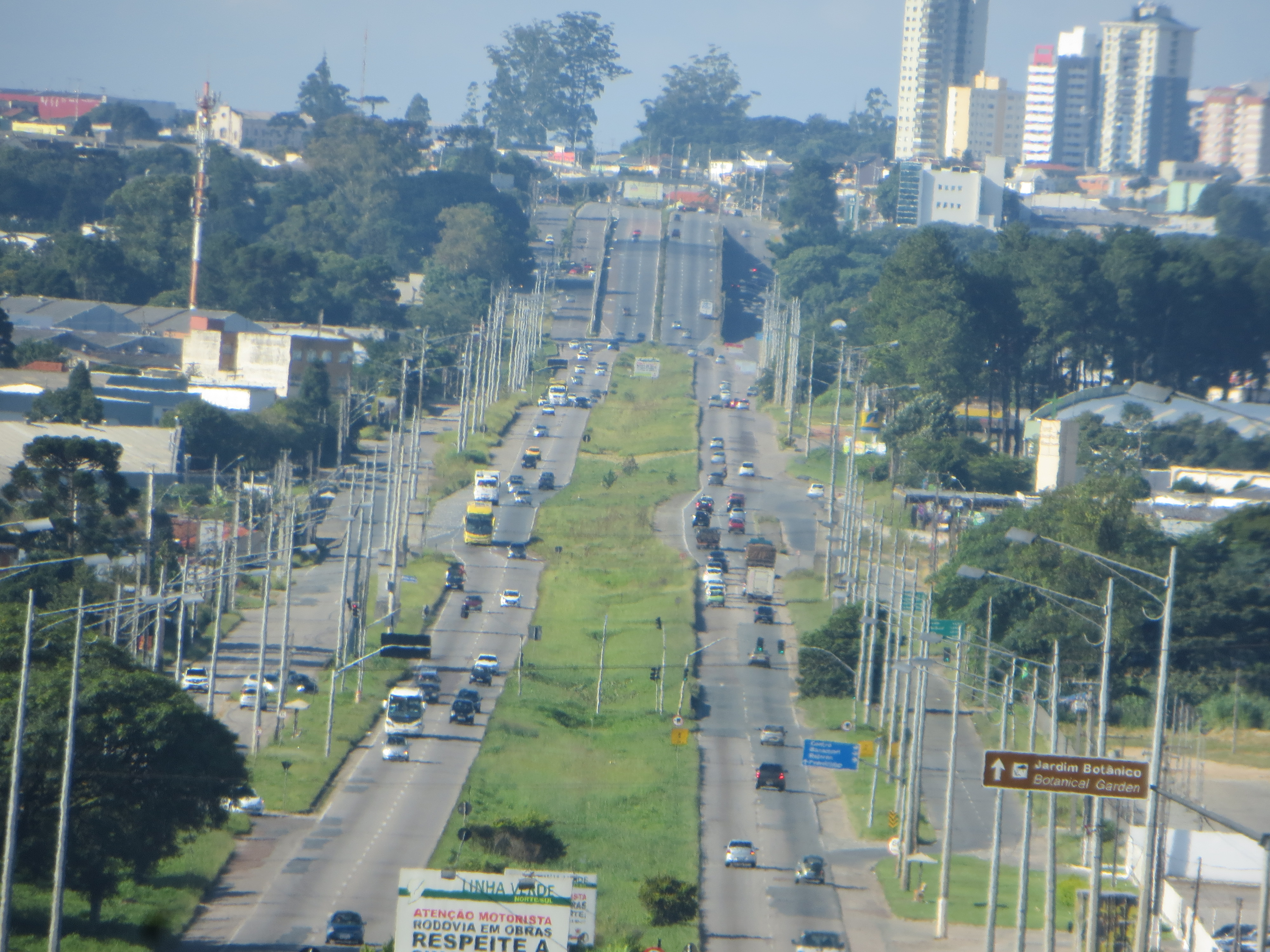 Um trecho da BR-116 (atual Linha Verde), em Curitiba, capital do estado brasileiro do Paraná.